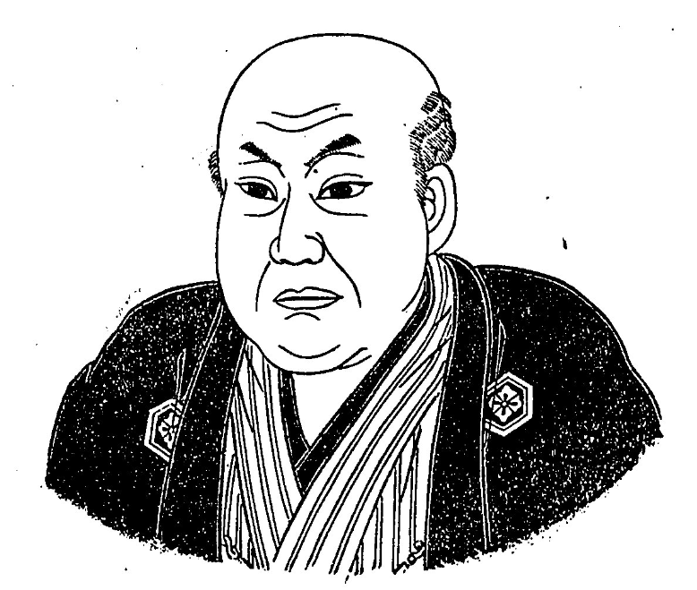 根岸浜吉出世鑑 酒井亀鶴 述[他] (酒井亀次郎, 1894)